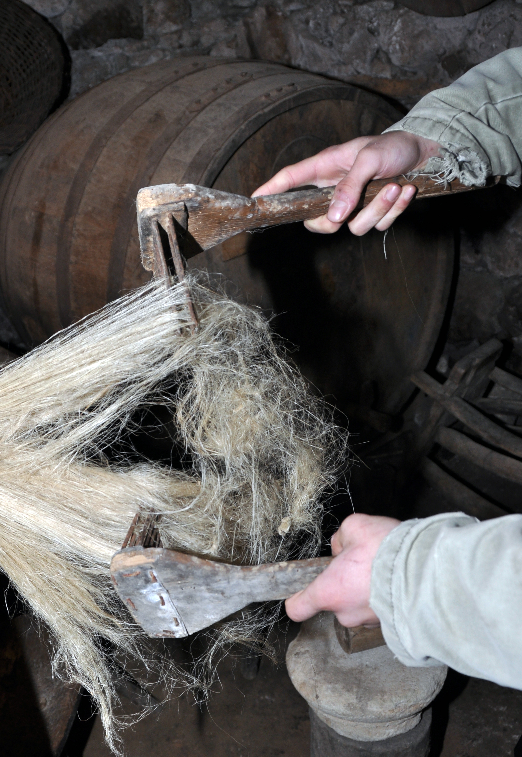 Обработка на коноп